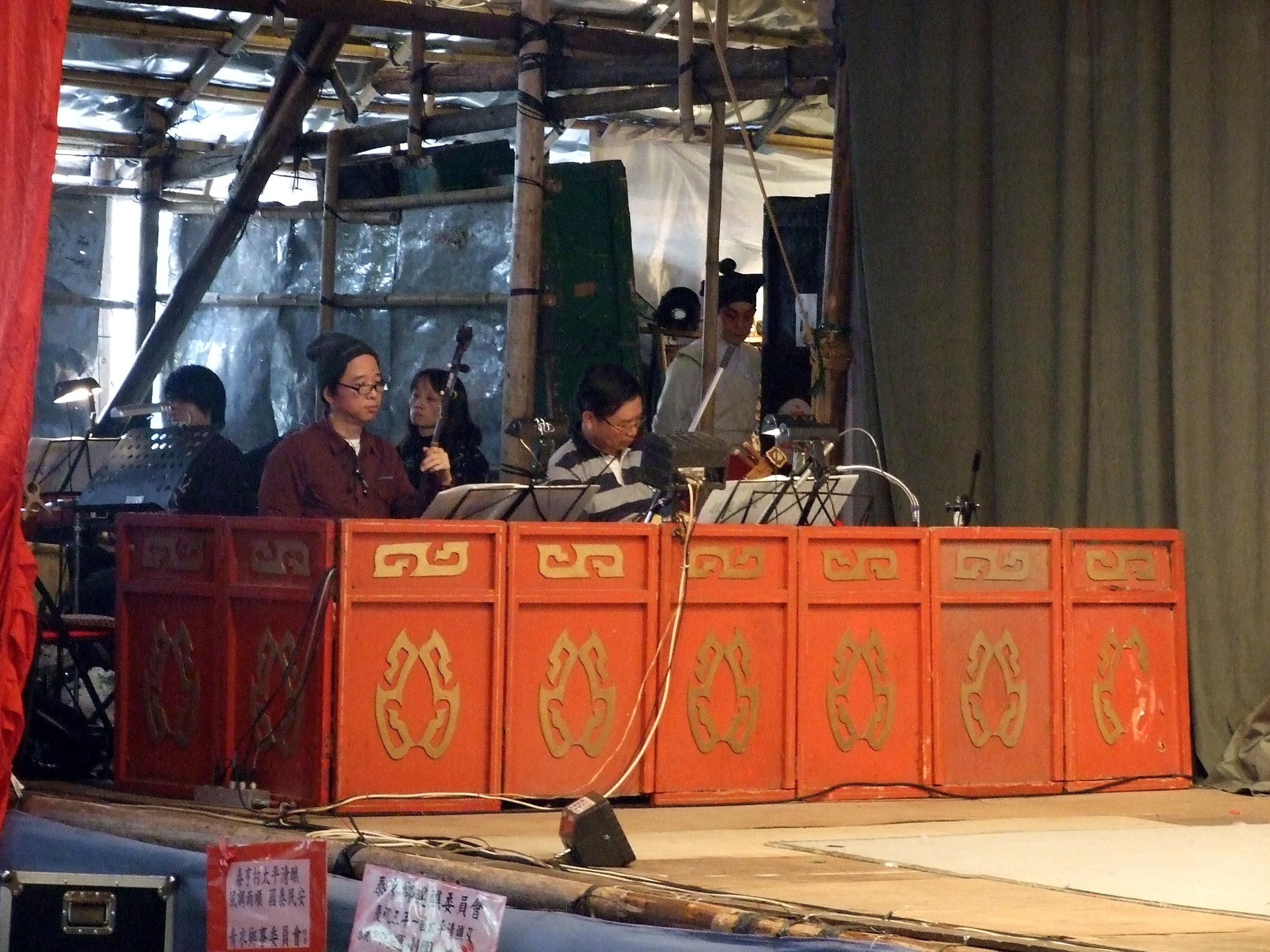 中文（香港）: 粵劇樂師